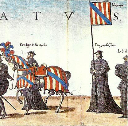 Emblema heráldico del Reino de Mallorca en guion y gualdrapas del caballo en las exequias por la muerte en 1558 de Carlos I de España y V como emperador del Sacro Imperio Romano-Germánico. Calcografía coloreada.